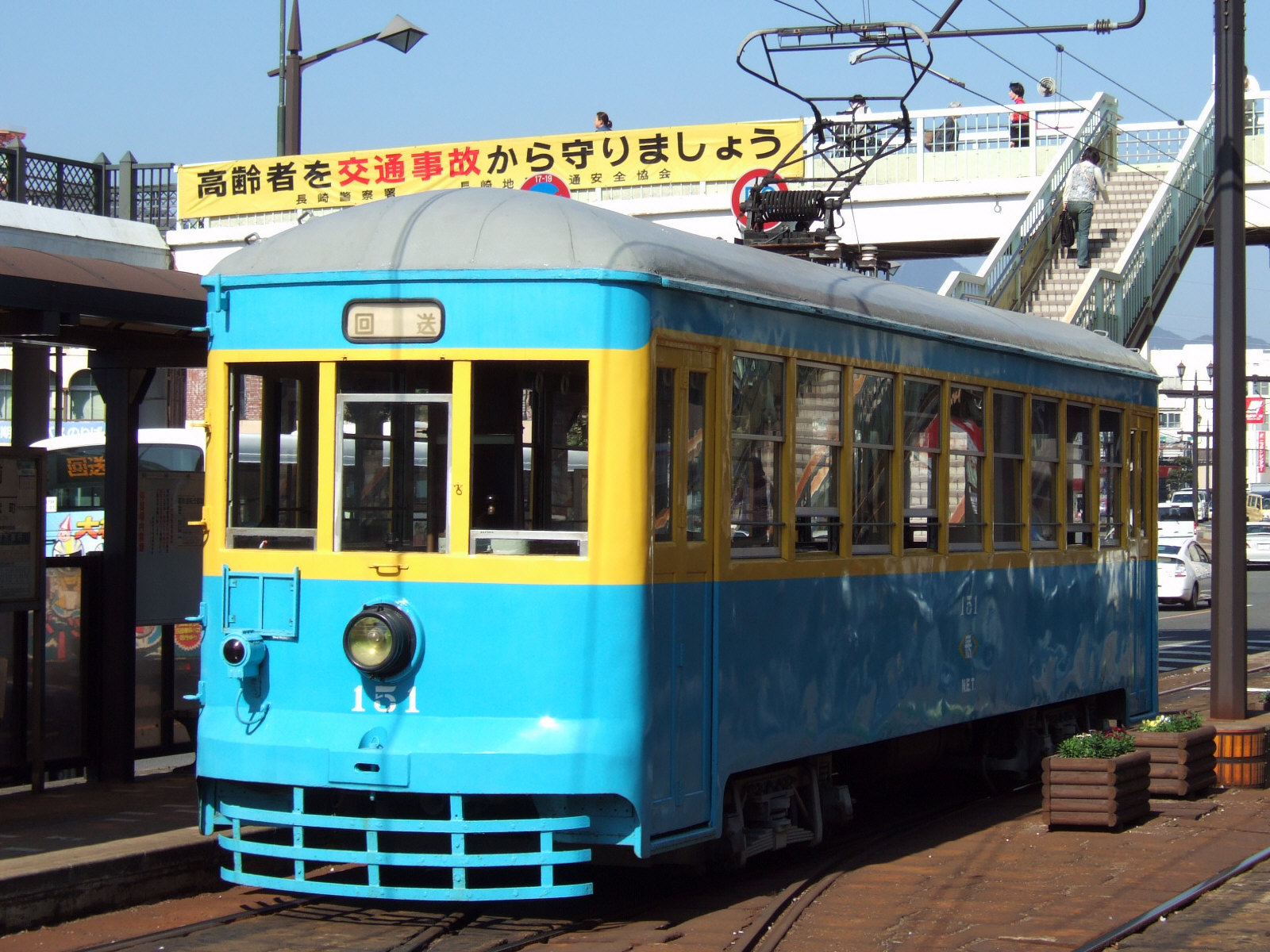 長崎電気軌道150形電車151号（長崎駅前電停にて、路面電車サミット記念運転）